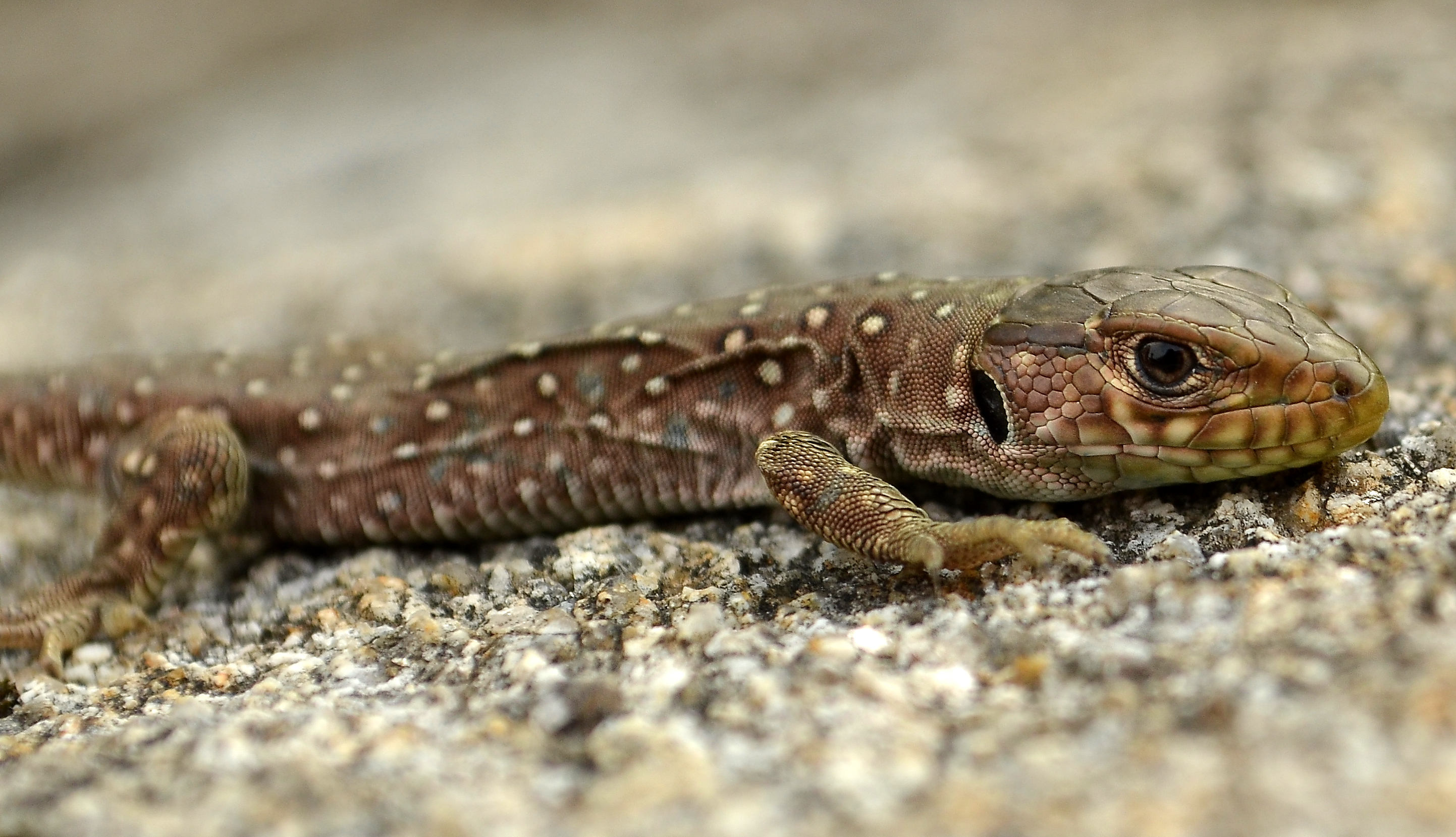 Lézard ocellé juvénile sur un rocher